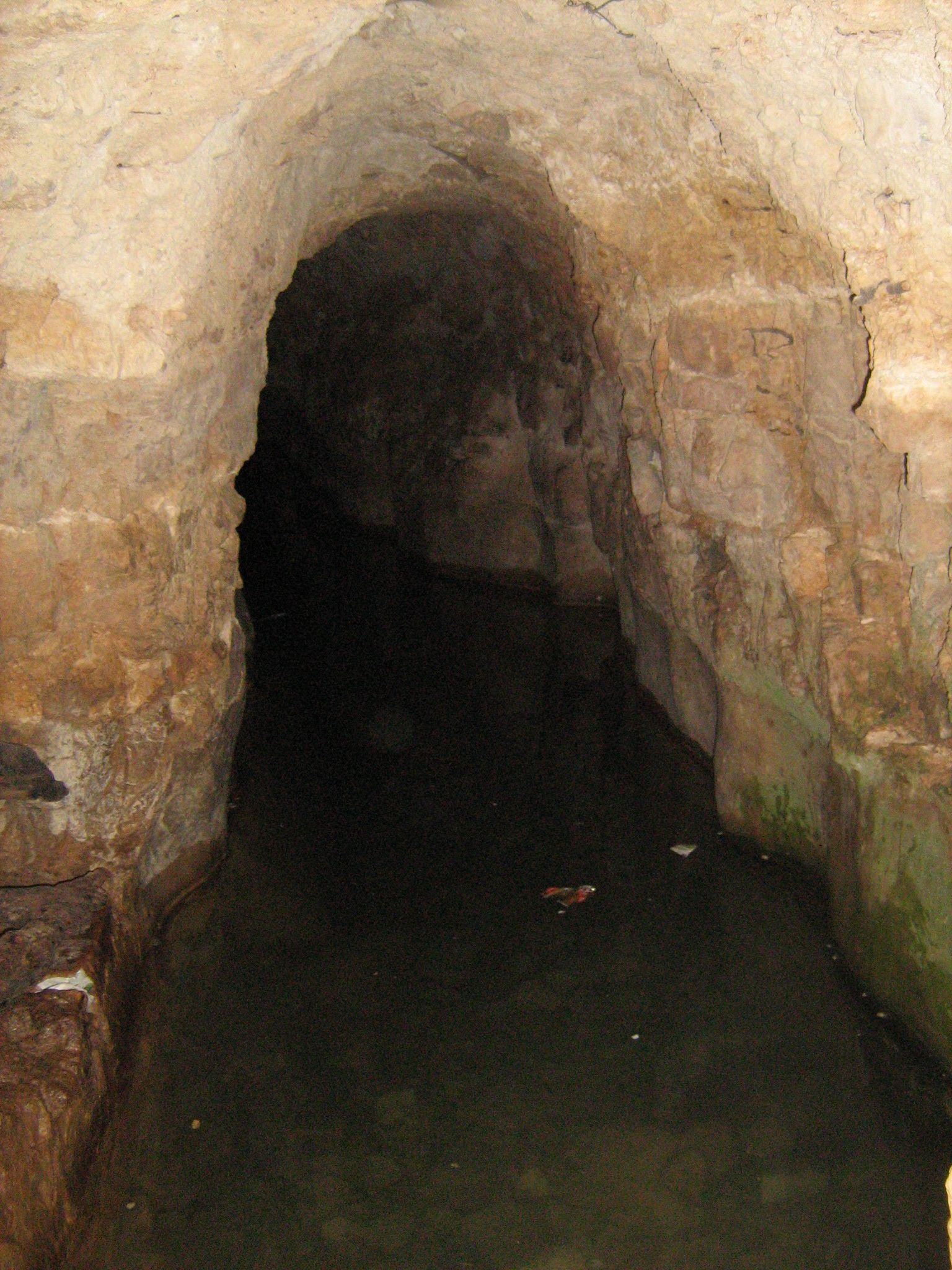 עין חנדק